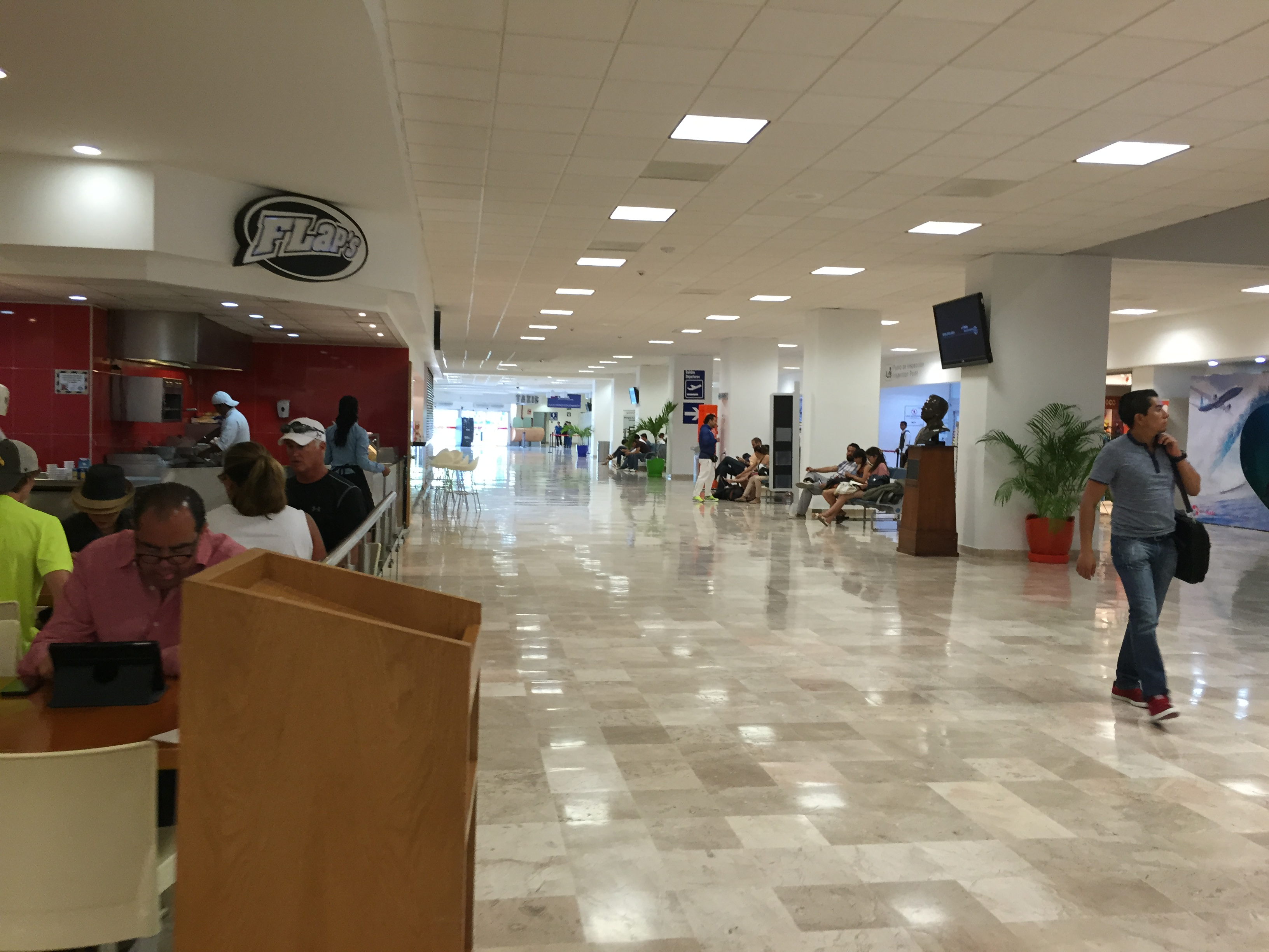 Pasillo principal del Aeropuerto de Ixtapa-Zihuatanejo.